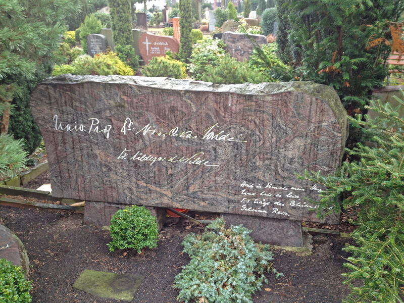 Das Grabmal des verstorbenen Hans-Oskar Wilde (1907 – 1992) auf dem Neuen St. Nikolai Friedhof Hannover (Foto vom 8.3.2013; Sven Friedrich Cordes